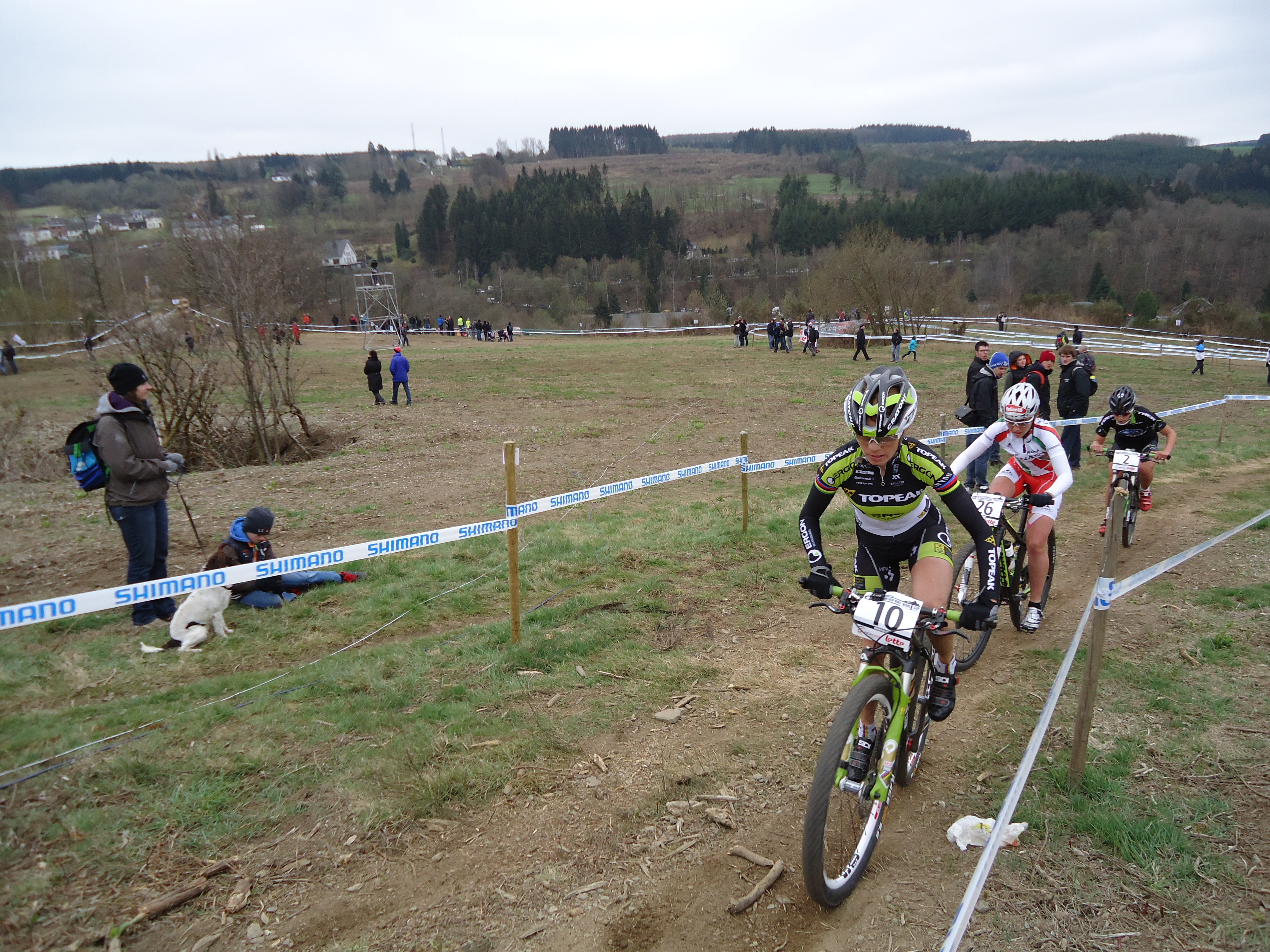 Irina Kalentjeva in actie tijdens de race XCO MTB World Cup Houffalize(BEL)